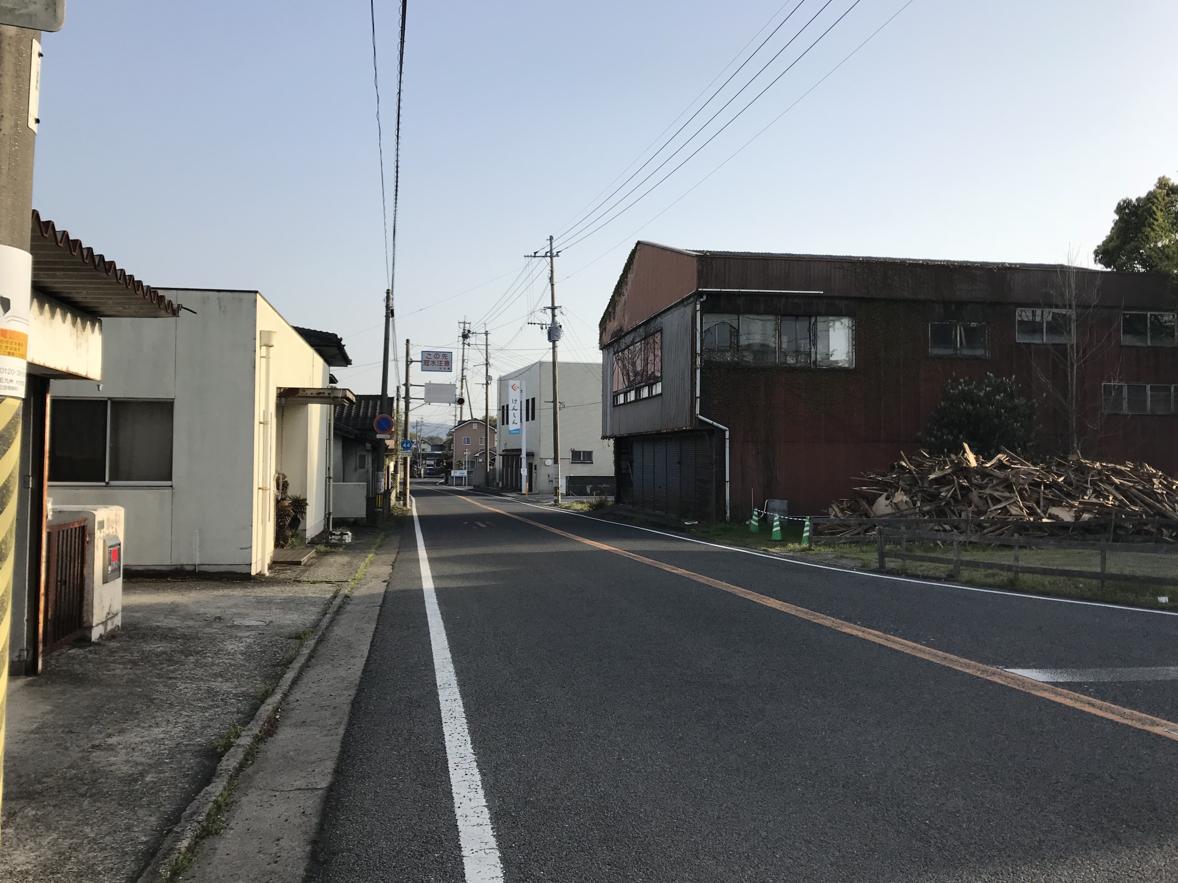 小松橋西詰より望む大分県道44号